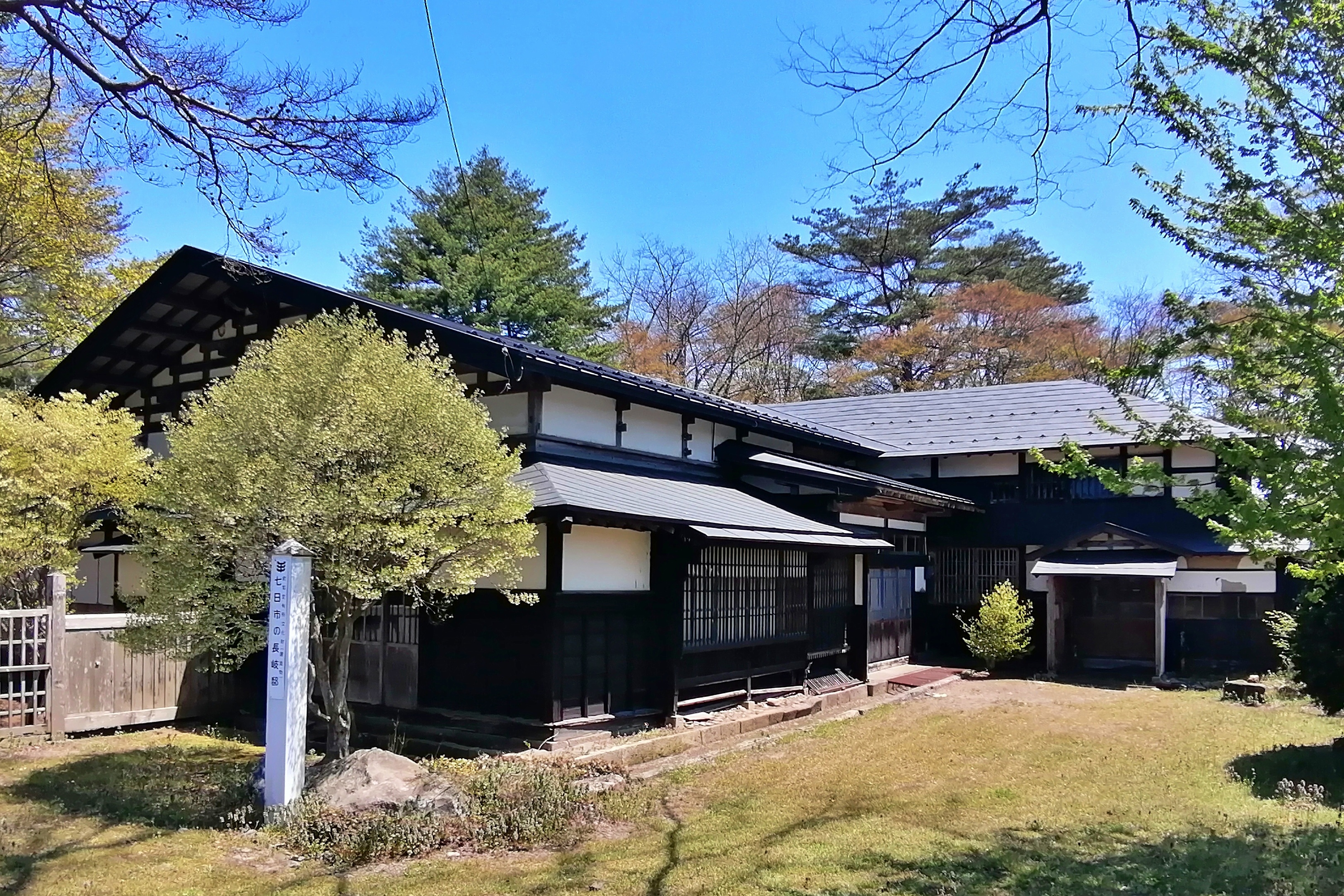 市指定文化財「長岐邸」- 北秋田市七日市